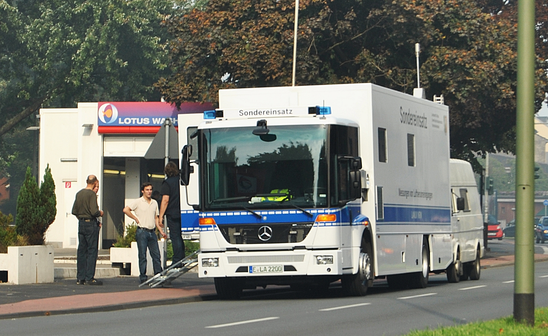 Das Laborfahrzeug für Messungen von Luftverunreinigungen des Landesamtes für Natur, Umwelt und Verbraucherschutz Nordrhein-Westfalen (LANUV) bei einem Einsatz aufgrund des Großbrandes der Schrottinsel im Duisburger Hafen.